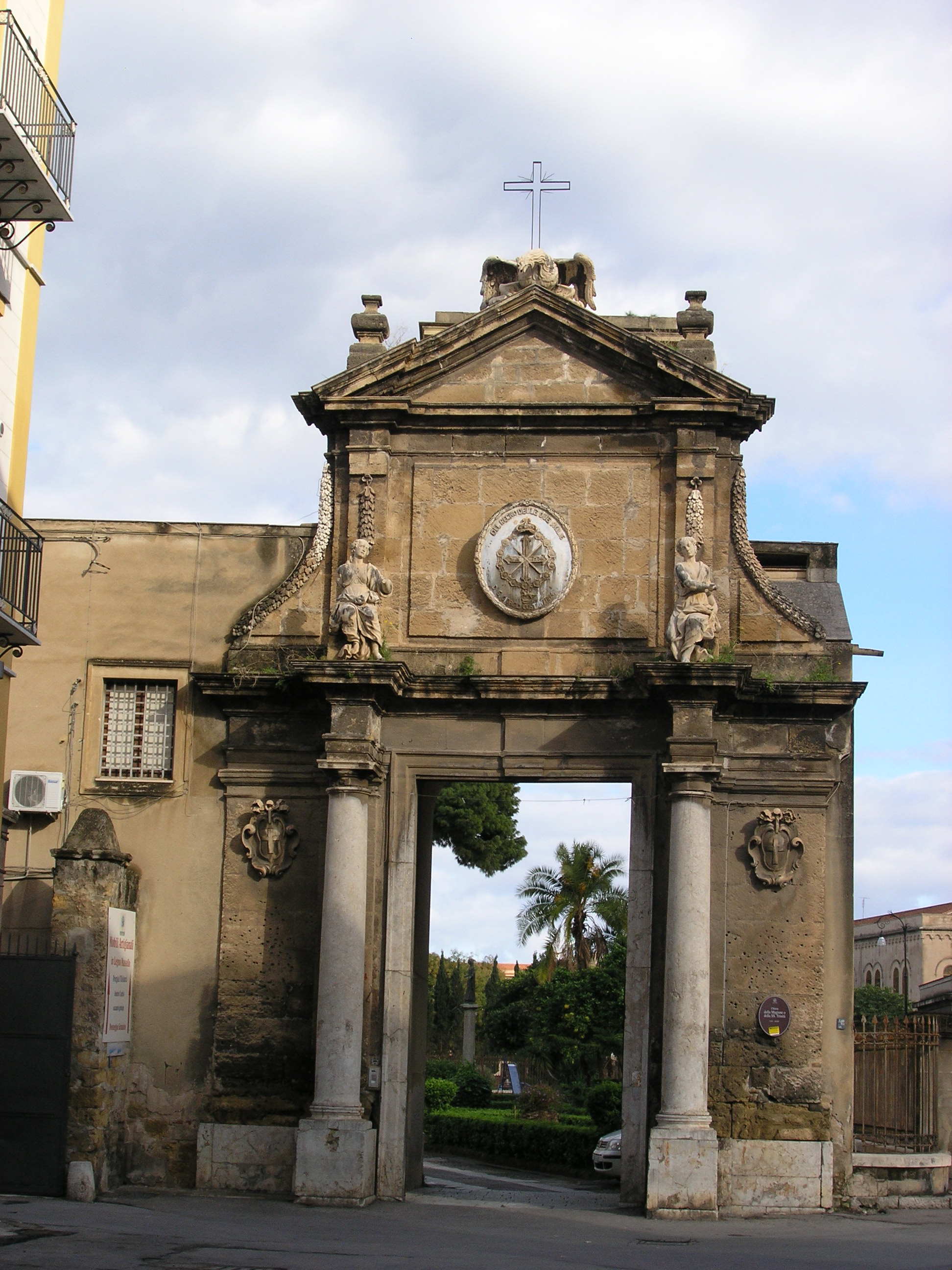 Sicilianu: La Maggiuni